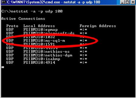 gusano informatico slammer